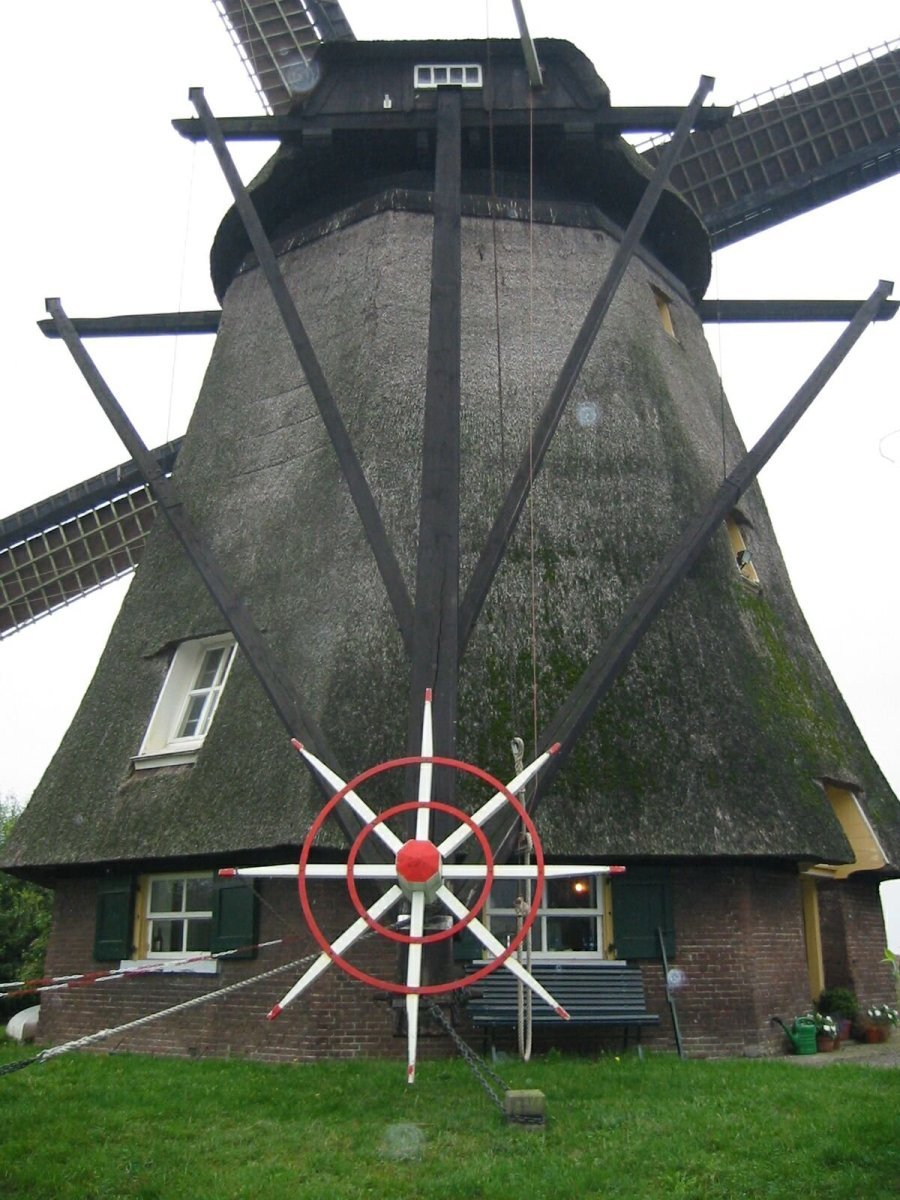 v.h. Poldermolen Wadenoijen/ Ten-Bruggencatenummer: 10674: Achtkante grondzeiler met volle zeilen van achteren gefotografeerd (opmerking: Foto gemaakt in het kader van het project Actualisering Monumentenregister (AMR).)